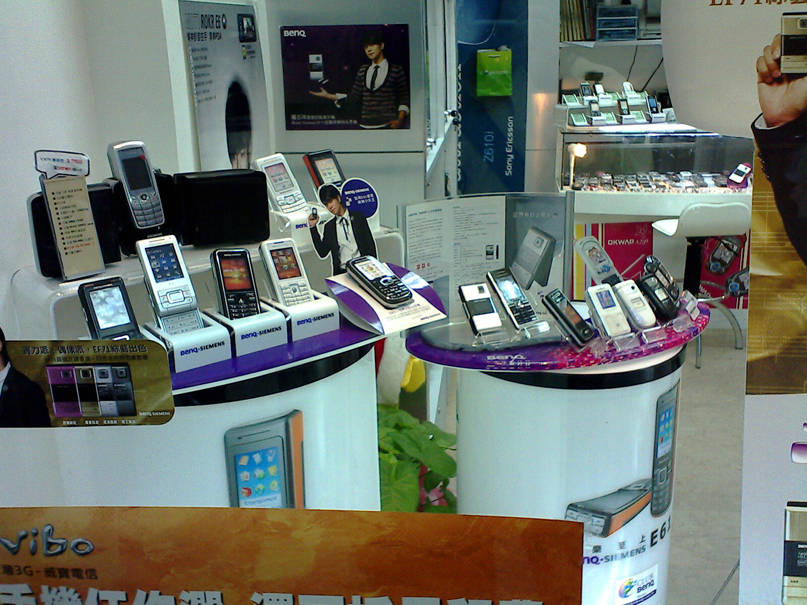 BenQ-Siemens手機販賣店。